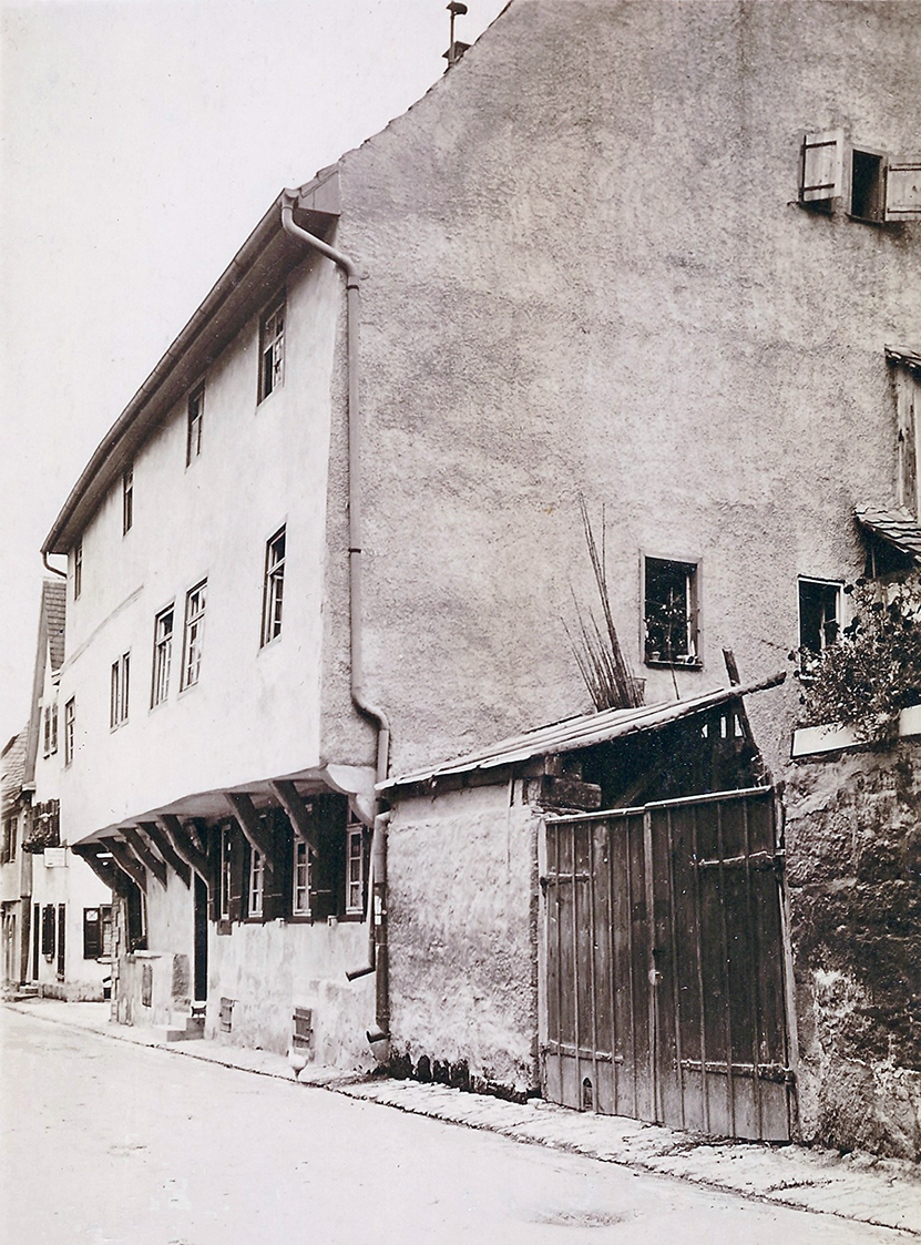 Ostergasse 16 in Markgröningen vor 1970 (von NW). Ehemaliges Haus von Aberlin Jörg, danach von Johannes Jörg. Abgerissen und ohne weite Auskragung neu aufgebaut; Neidkopf an nordöstl. Hausecke erhalten